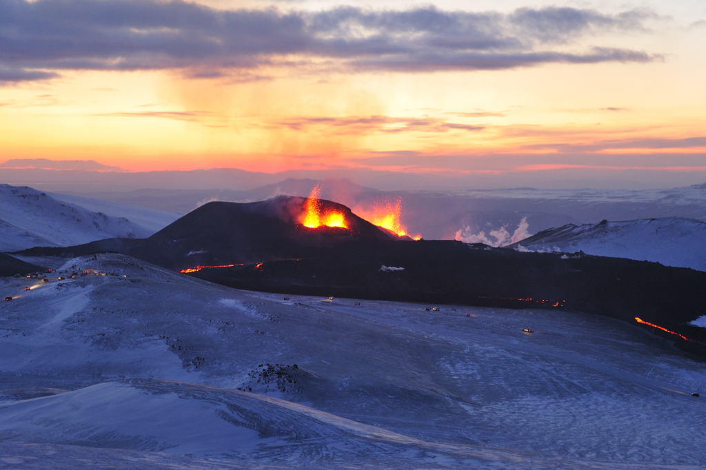 Seit 20.03.2010 ist auf dem Fimmvörðuháls ein Vulkanausbruch im Gange, der aufgrund chemischer Analysen der ausgeworfenen Materialen dem System des Eyjafjallajökull zugerechnet wird.